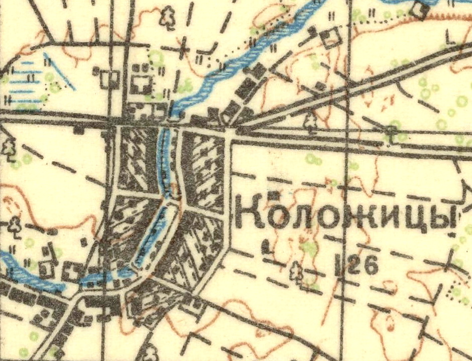 Топографическая карта Ленинградской области, квадрат О-35-23-В (Хотыницы), деревня Каложицы